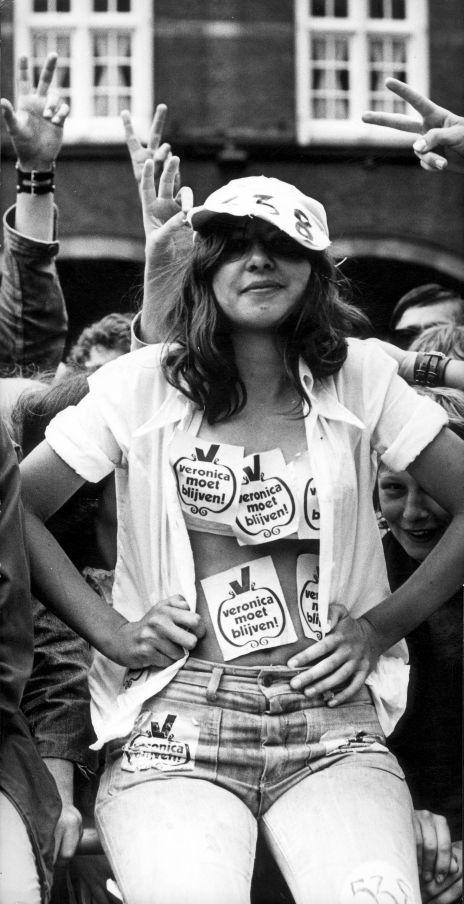 Meisje vol geplakt met 'Radio Veronica' stickers tijdens een demonstratie op Binnenhof voor behoud van de radiozender (piraat). 28-6-1973